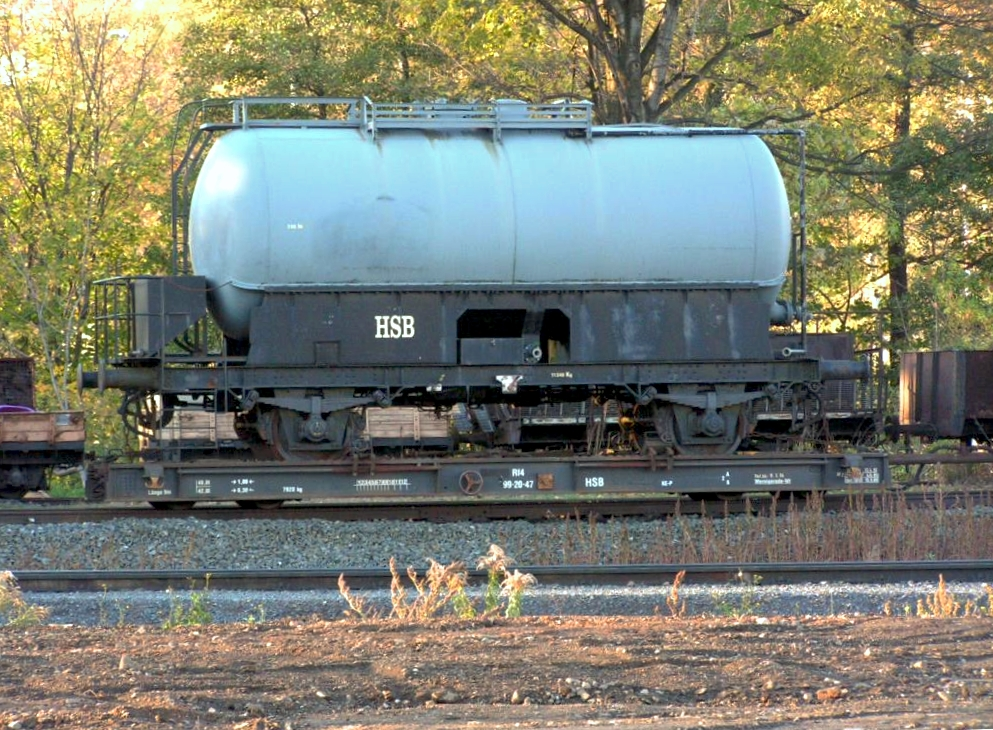 Rollwagen HSB (Harzer Schmalspurbahnen) beim Bahnbetriebswerk Wernigerode Westerntor